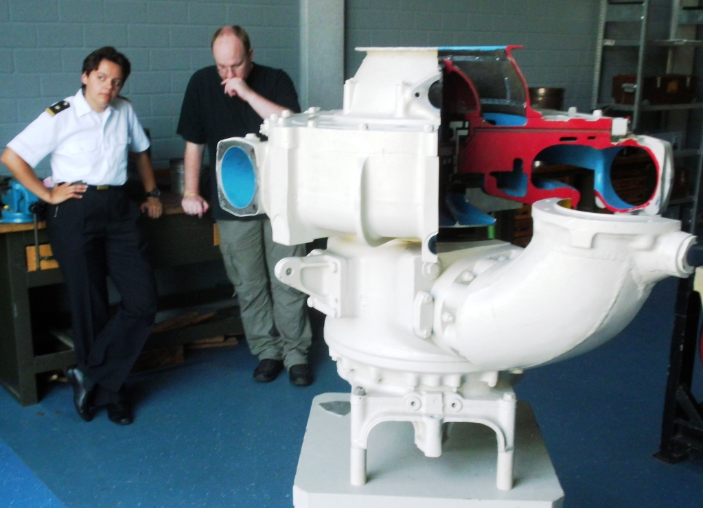 Abgasturbolader